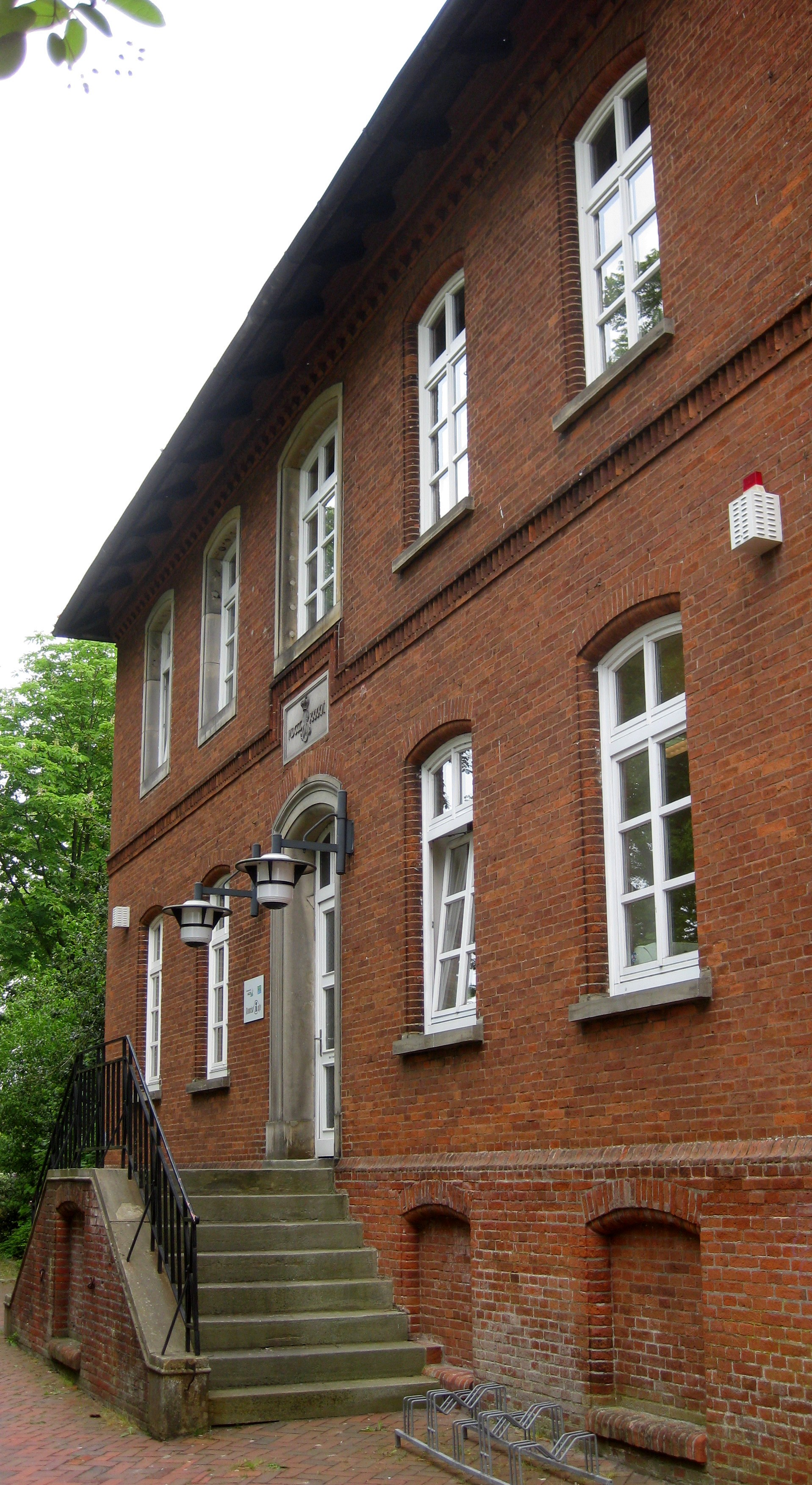 Das ehemalige mtsgericht zu Hagen (i.Br.) ist heute die Touristeninformation der Kommune